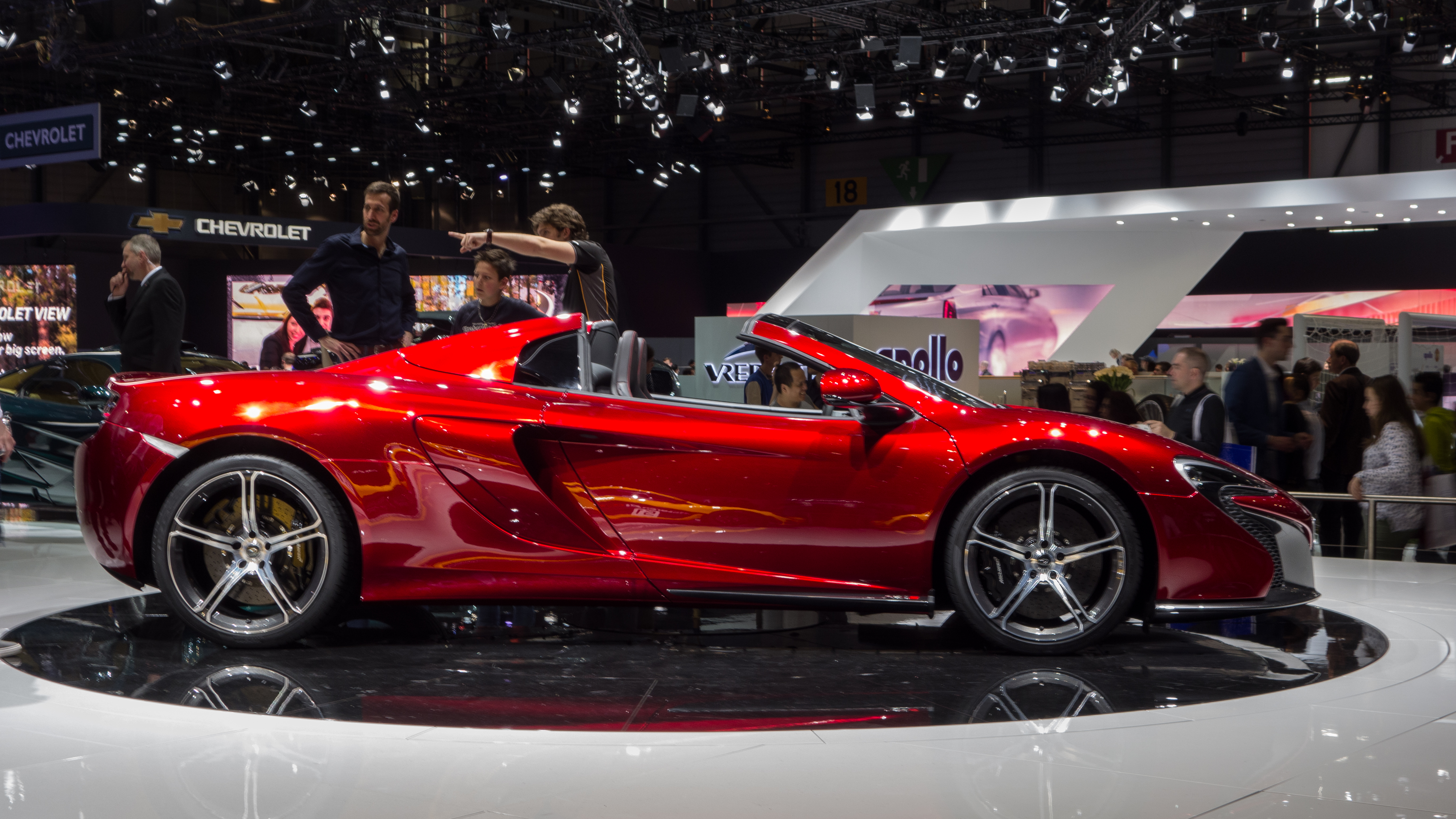 500ex